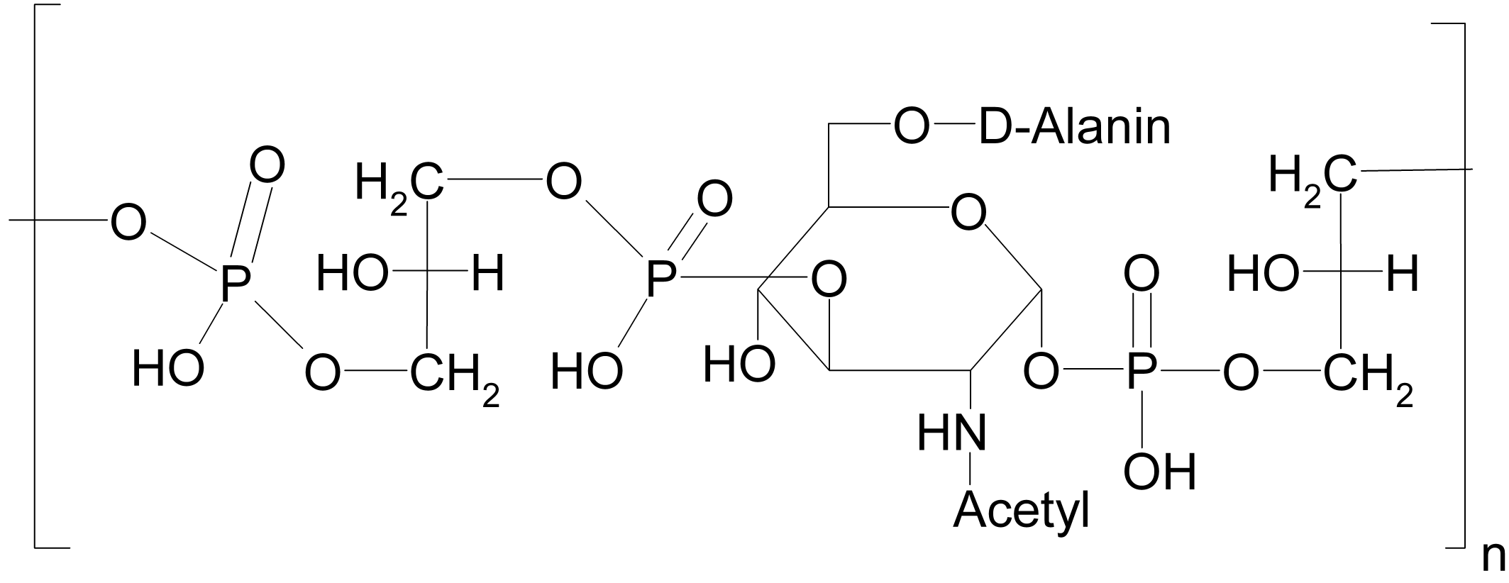 Struktur einer Teichonsäure